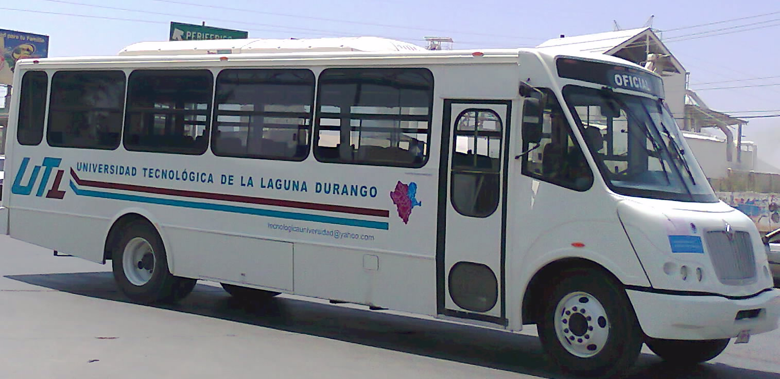 Autobús de la Universidad Tecnológica de Lerdo.